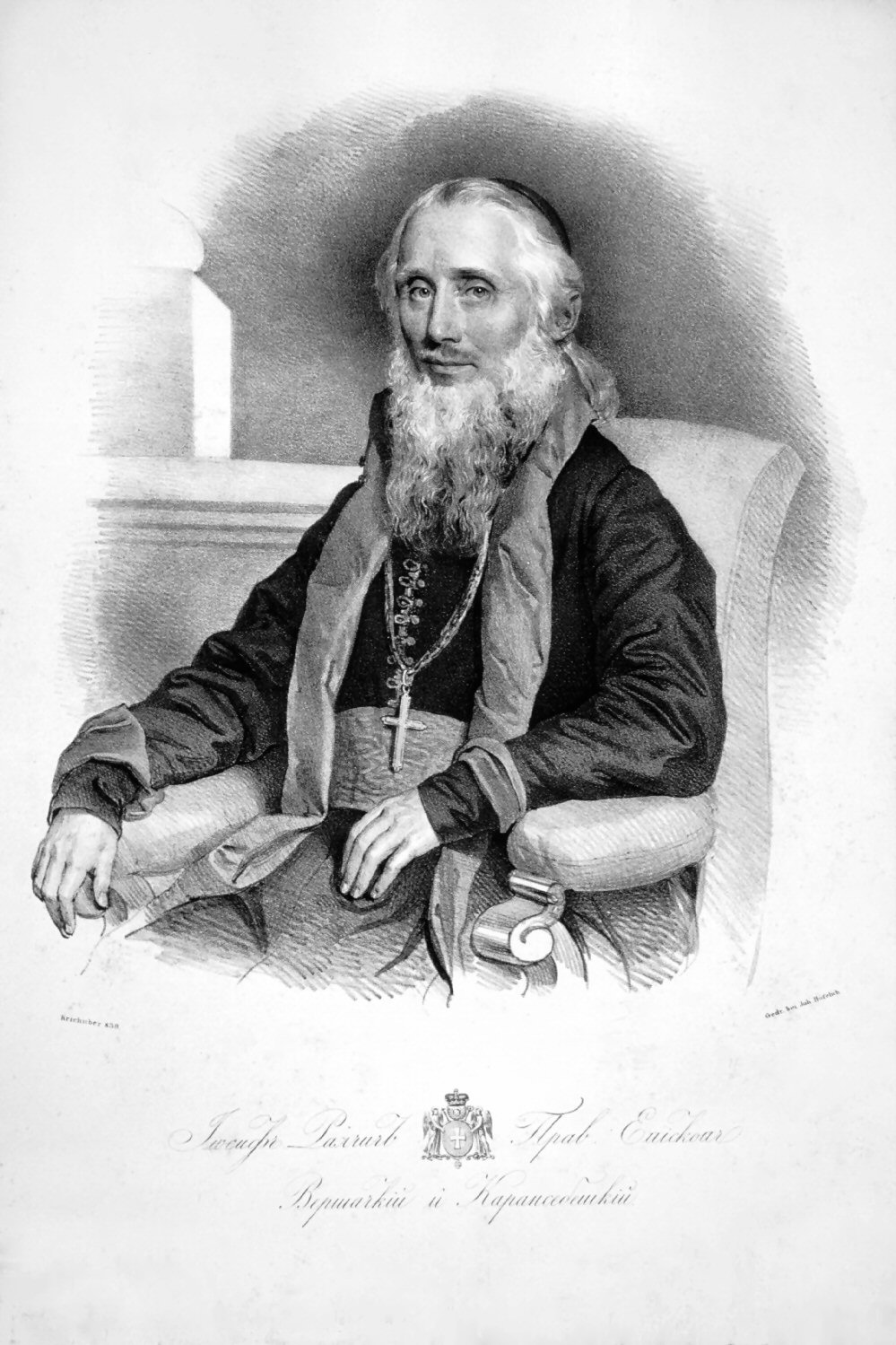 Josef Freiherr von Rajacic(17985-1861), griechisch-unierter Bischof von Werschetz und Karansebes, Metropolit von Karlowitz. Lithographie von Josef Kriehuber,1839